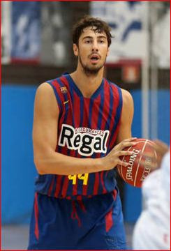 Foto sacada de Sport